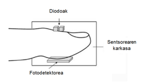 Oximetroaren eskema.